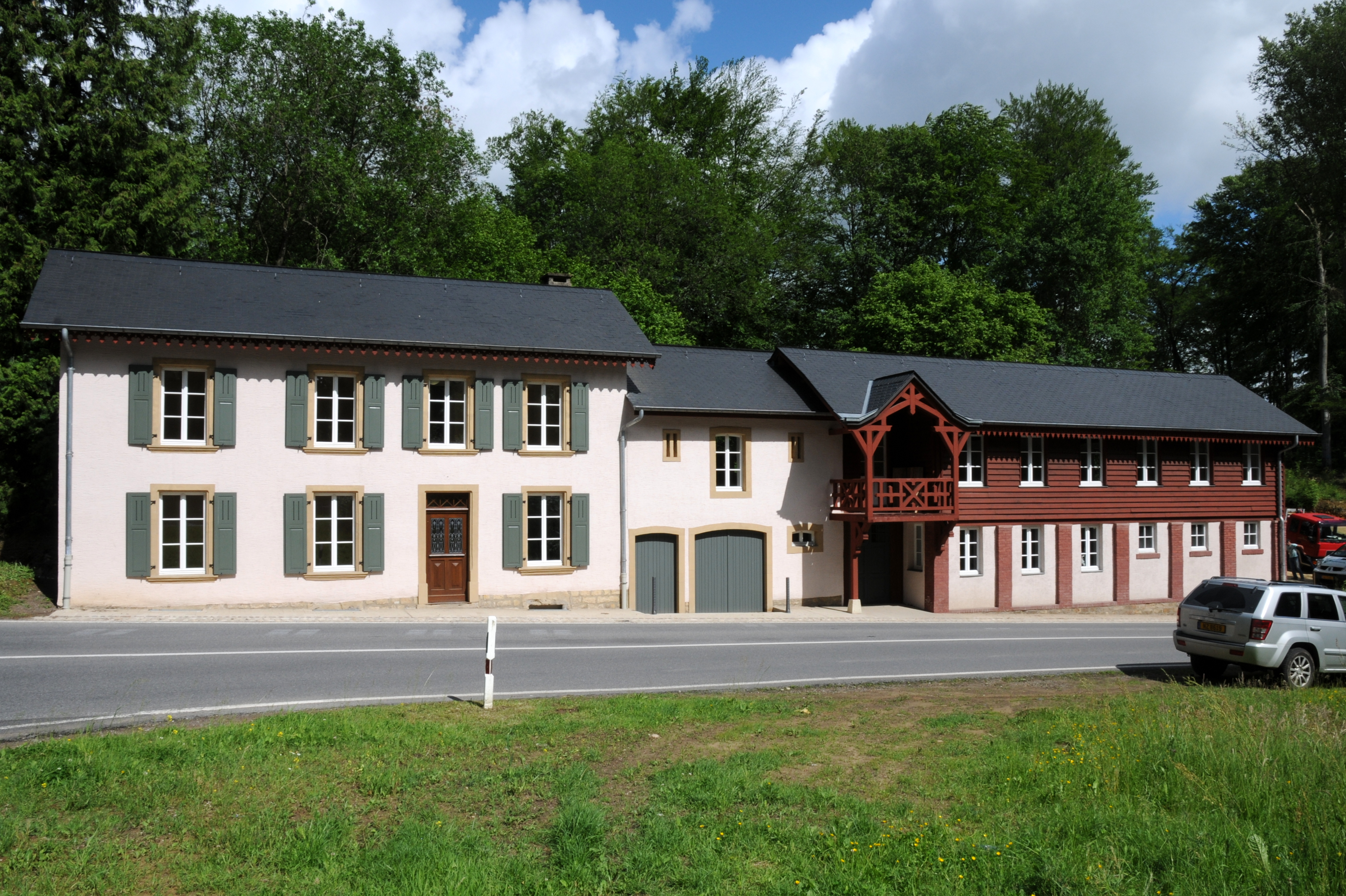 D'renovéiert Haiser um Stafelter am Juni 2012.